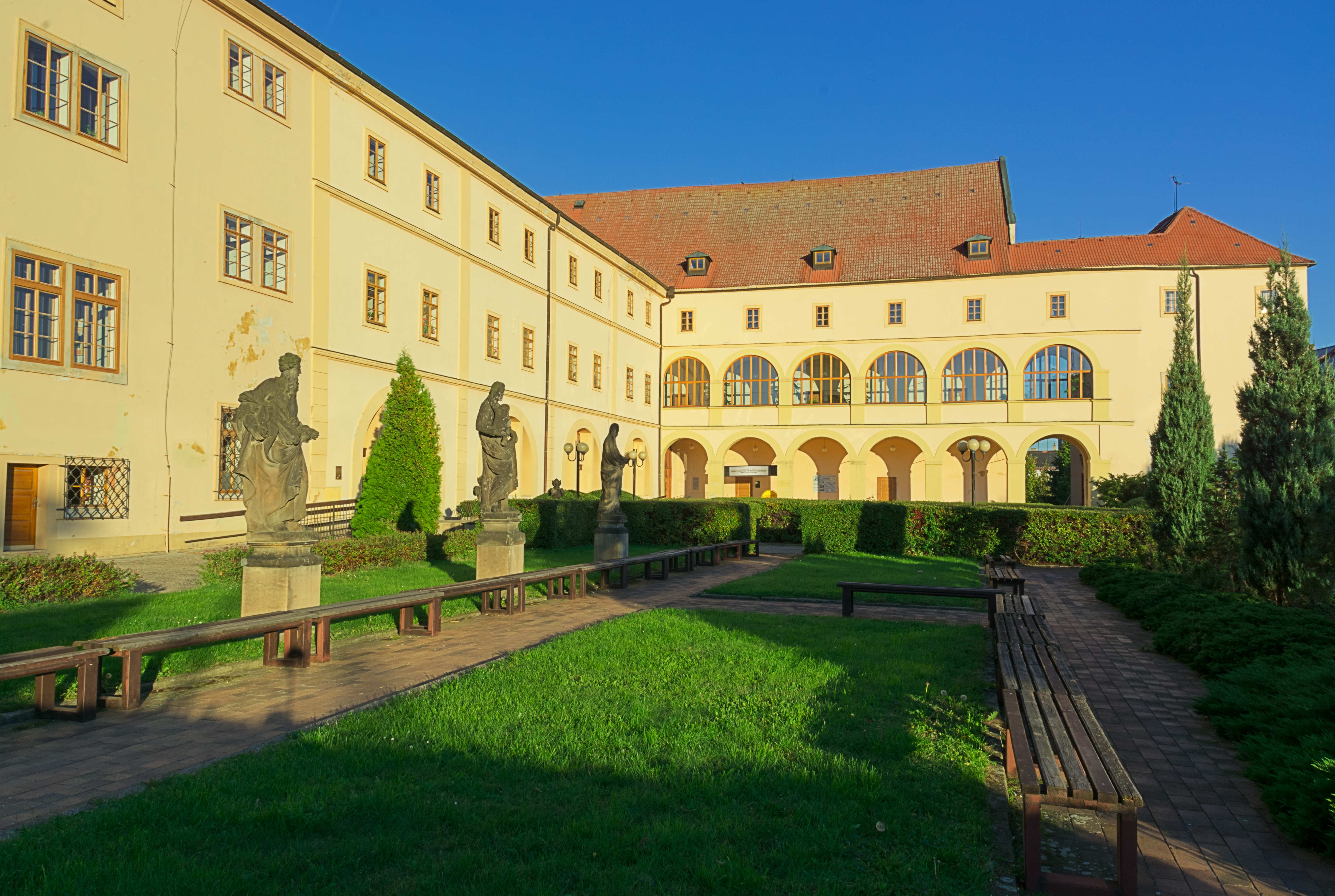 Kolej jezuitská (Chomutov), 1. máje, Chomutov